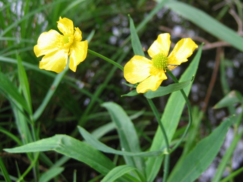 Zungen-Hahnenfuß Ranunculus lingua, Müritz-Gebiet